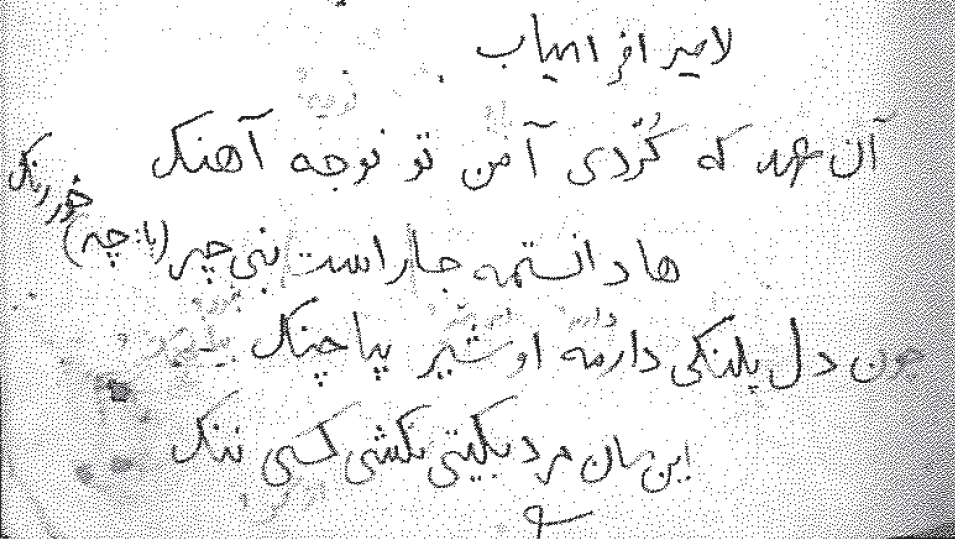 مازِرونی: کیا افراسیاب چلاوی ِشعرون که محمد قزوینی وشون ره اتا خطی نسخه سر جه بنویشته.